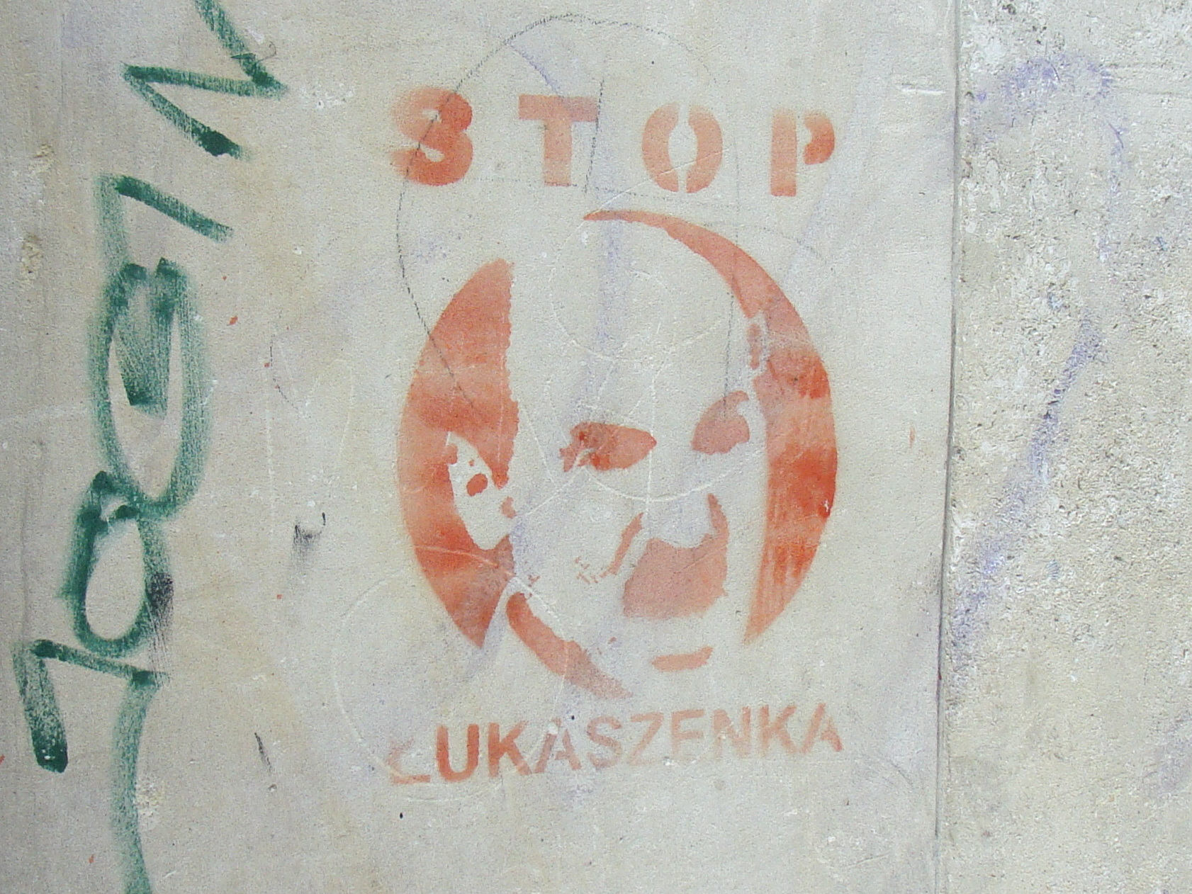 Graffiti na ścianie budynku na rogu ulic Świętokrzyskiej i Szkolnej w Warszawie.